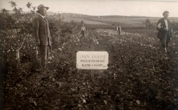 Jan Böhm - plantáže řůží v Blatné